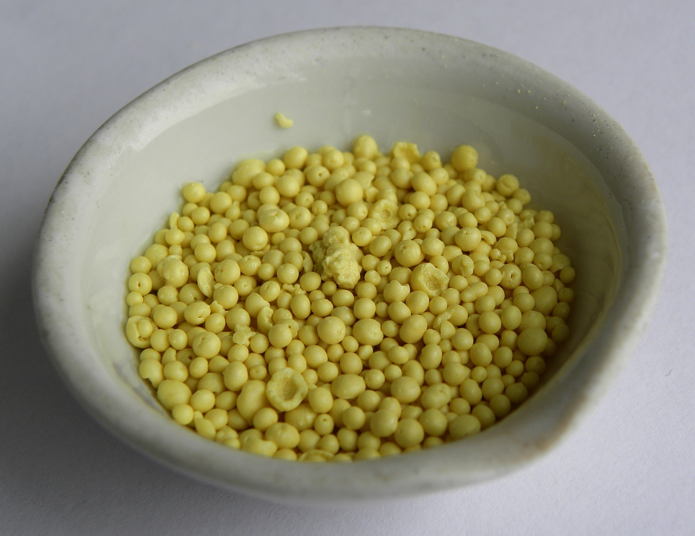 Siarka granulowana